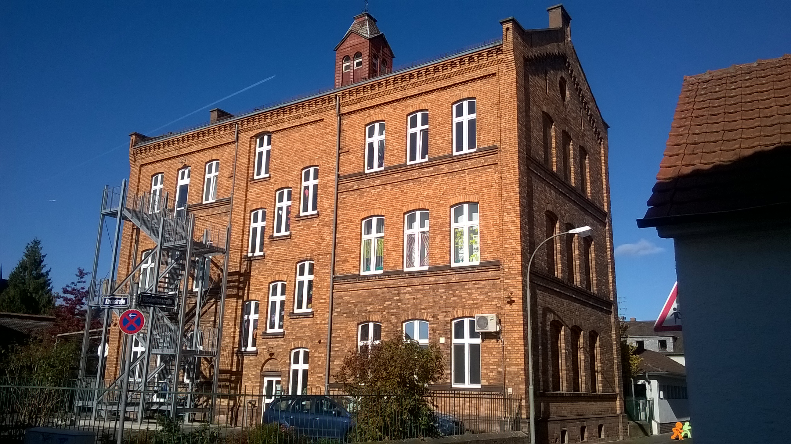 Kirchstraße 9, Mühlheim am Main. Kindervilla Basalto